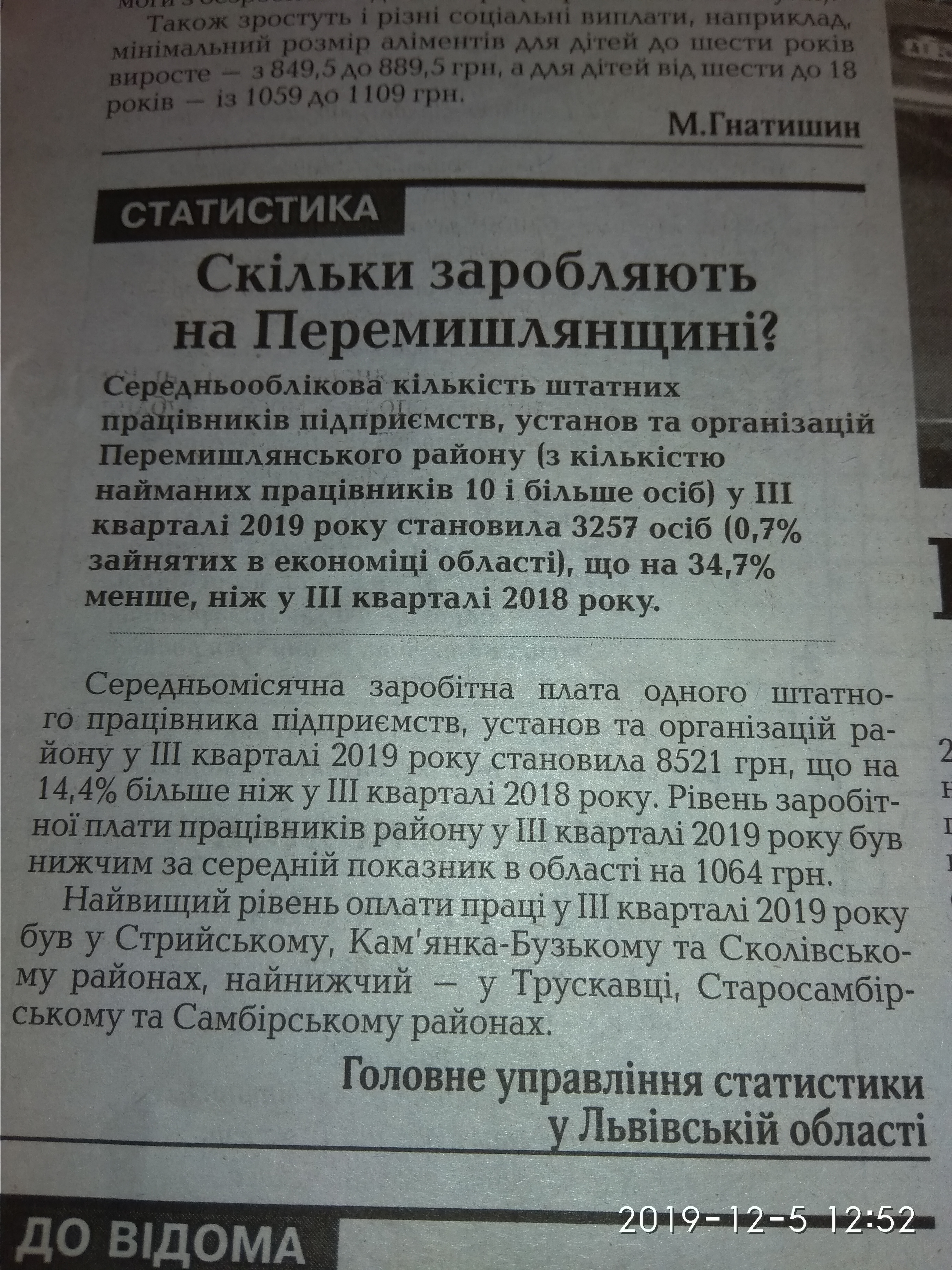 Скільки зароблять в Перемишлянах